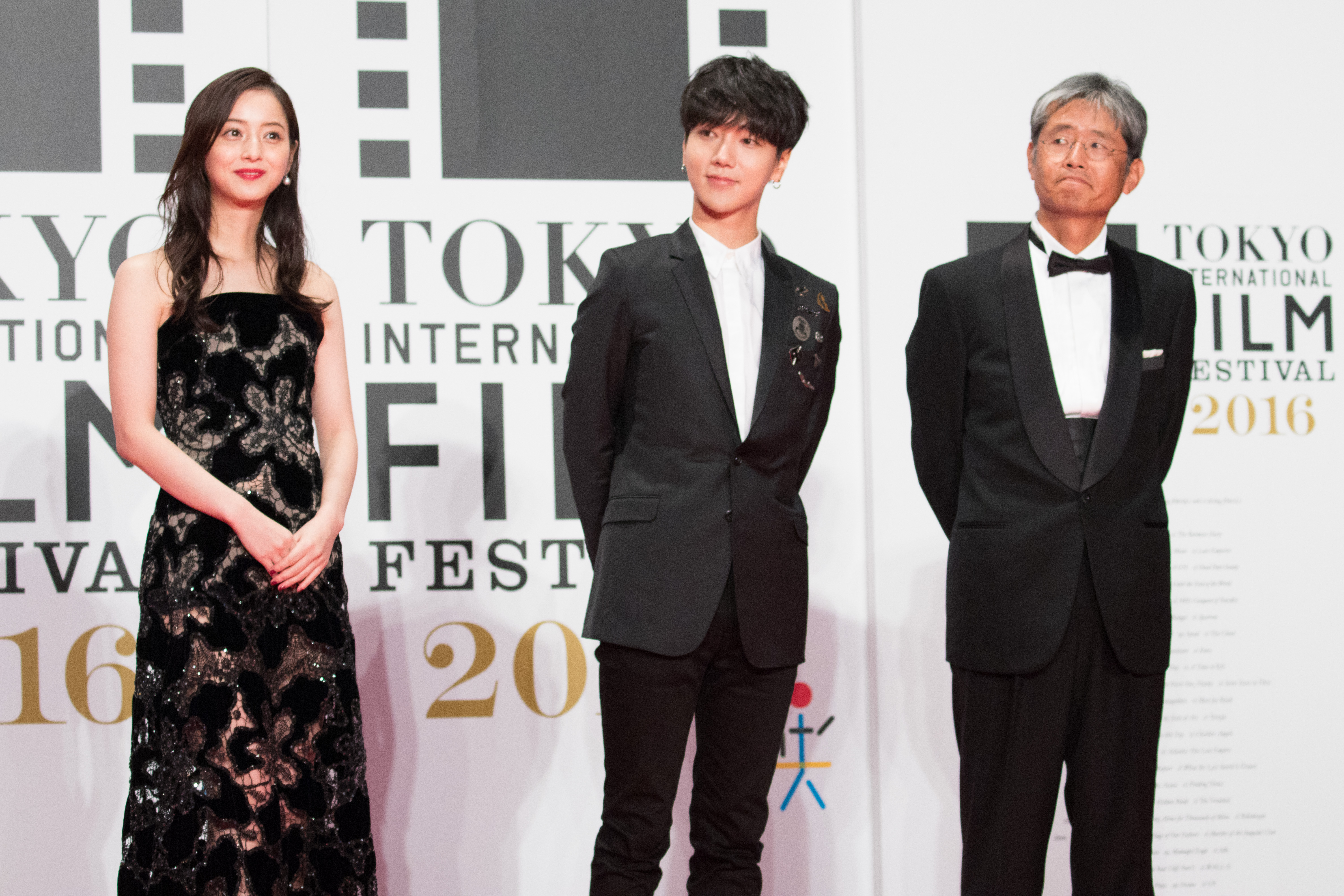 第29回 東京国際映画祭 オープニングセレモニー 佐々木希 イェソン (いきなり先生になったボクが彼女に恋をした)